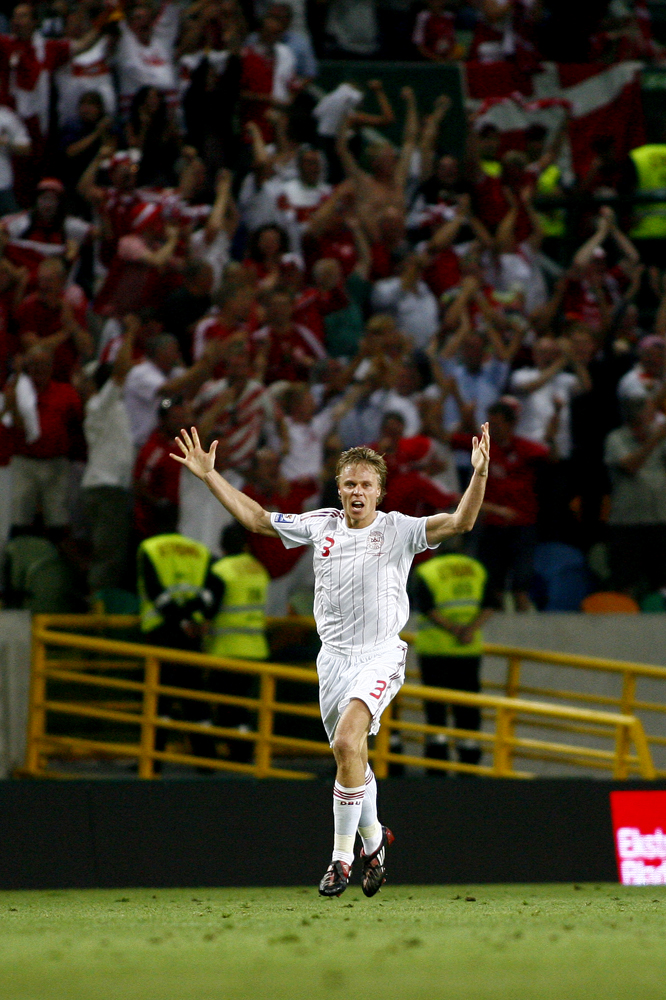 Martin Laursen (3); Portugal 2-3 Denmark, Lisbon September 10 2008